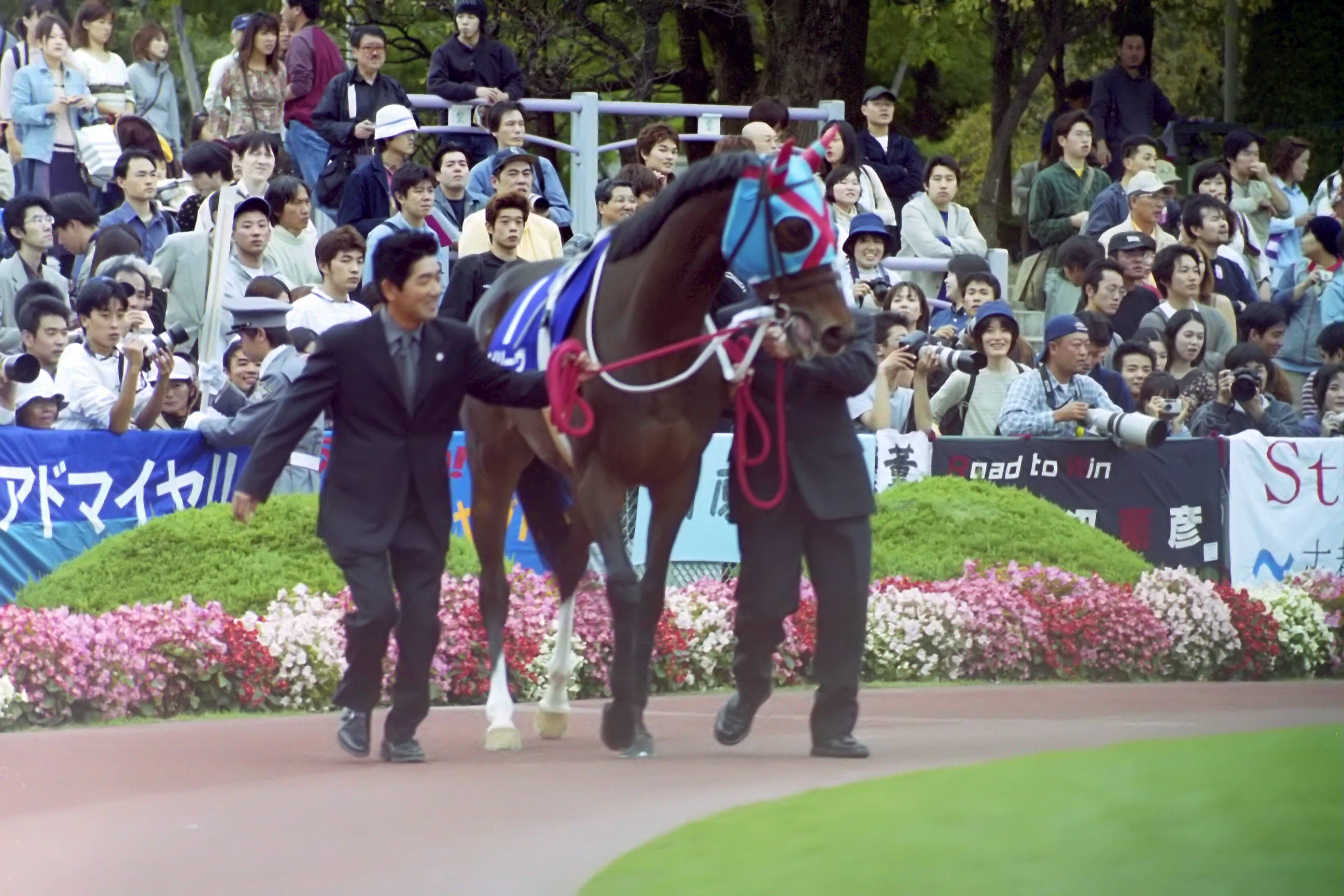 ビリーヴ号